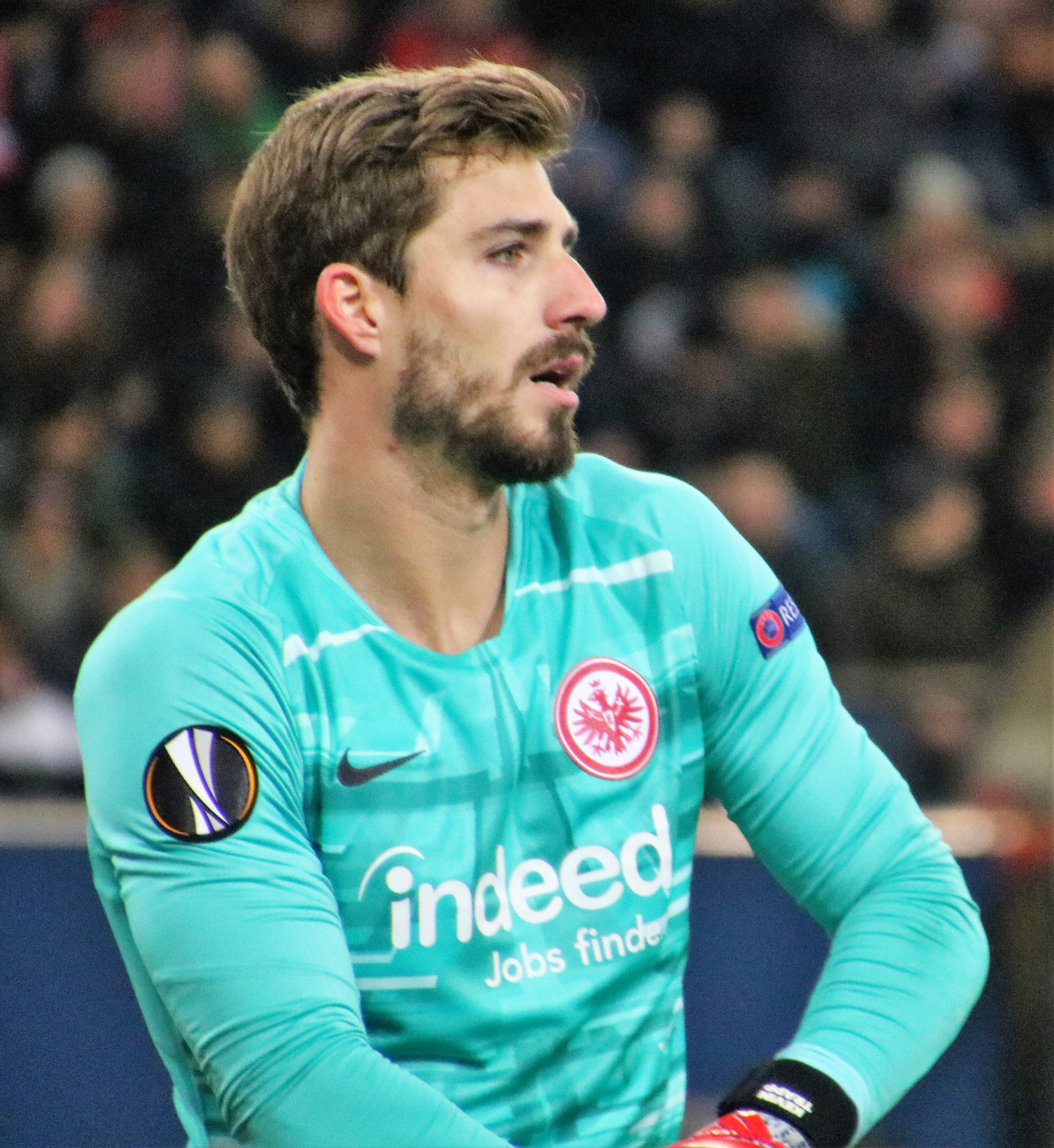 EL Sechzehntelfinale Rückspiel 2:2